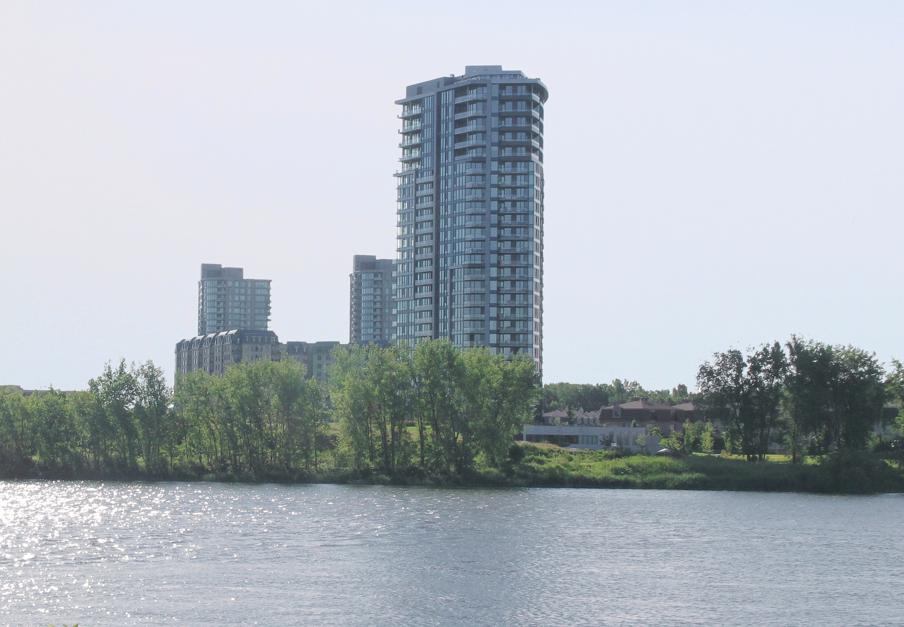 Tours résidentielles à la pointe sud de l'Ile-des-Soeurs